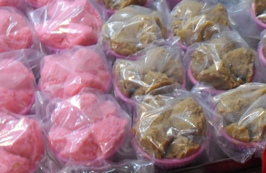 Bân-lâm-gú: 過年時仔佇菜市仔賣的發粿。（佇臺灣臺中豐原翕的）